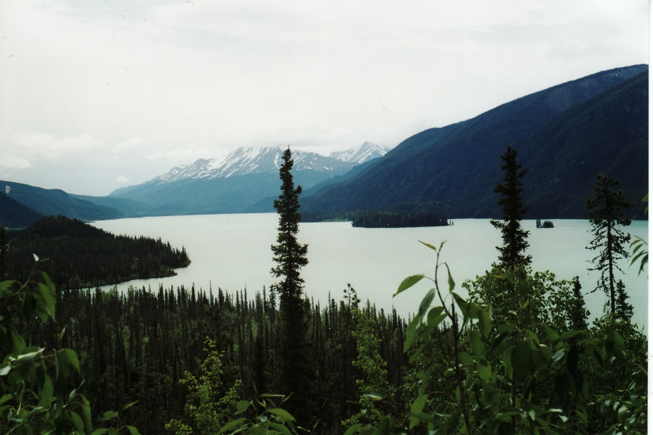 Muncho Lake